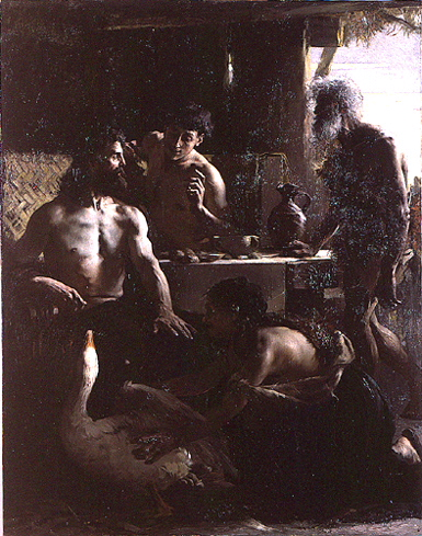 Alexandre-Claude-Louis Lavalley, Philémon et Baucis, 1891, Paris, Ecole Nationale Supérieure des Beaux-Arts